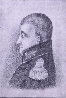 Hans Henrik Gripenberg efter teckning av Th. Wasastjerna; orig., en miniatyr, tillhör Förlagsaktiebolaget Söderström et C:o